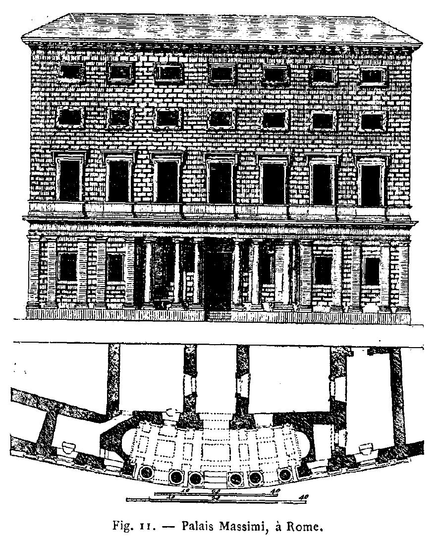 Palazzo Massimo in Rome.